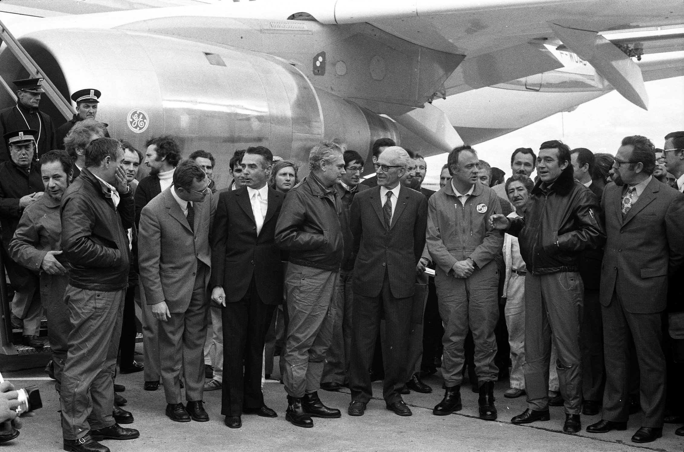 Pistes de Blagnac. 28 octobre 1972. Photo de groupe des membres d'équipage et des personnalités d'Airbus au pied de l'avion : de g. à d. P. Canneil, R. Zinzoni (de profil), Roger Béteille (Directeur du programmet Airbus), Max Fischi (commandant de bord et 1er pilote), Henri Ziegler (Président de la Société Nationale et Industrielle de l'Aérospatiale), G. Scherer et Bernard Ziegler. Cliché pris lors du 1er vol d'essai de l'Airbus A300 B.